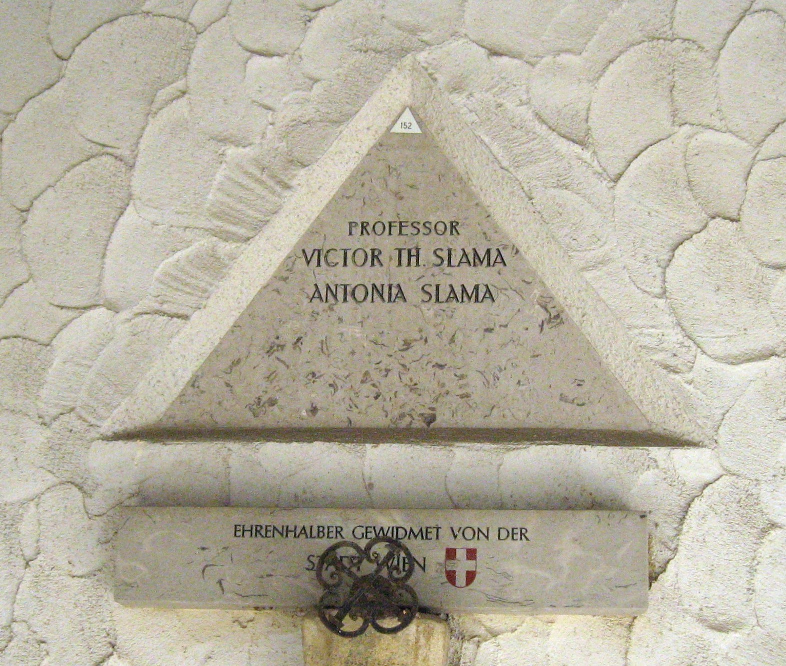 Wien, Feuerhalle Simmering, Urnennische Viktor Slama